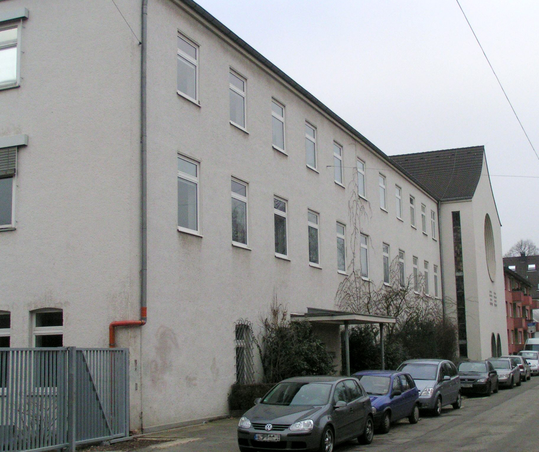 Marienschule in Leverkusen-Opladen